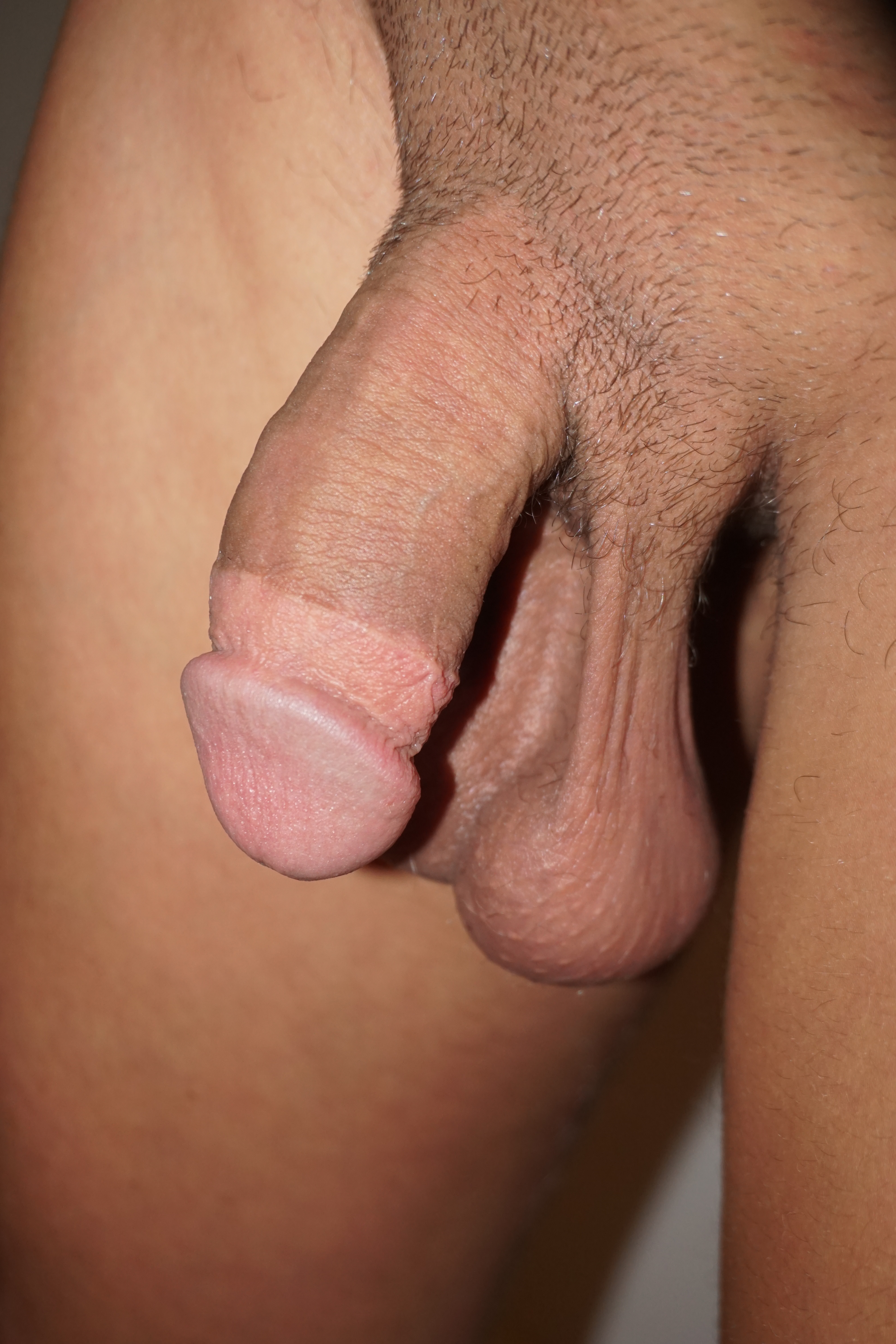 Hoden